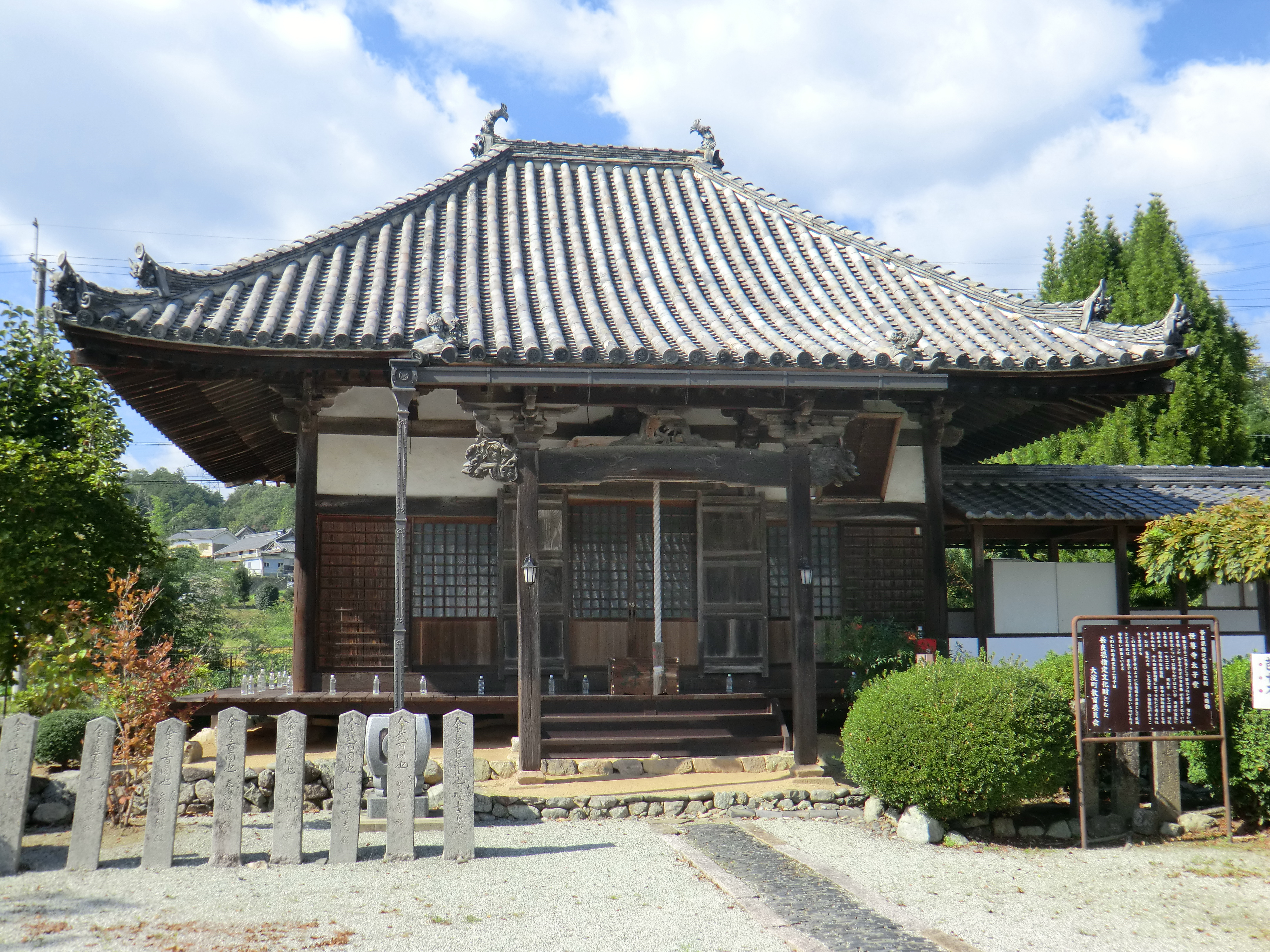 霊鷲山世尊寺（史跡比曽寺跡）・太子堂 (2014年10月撮影)